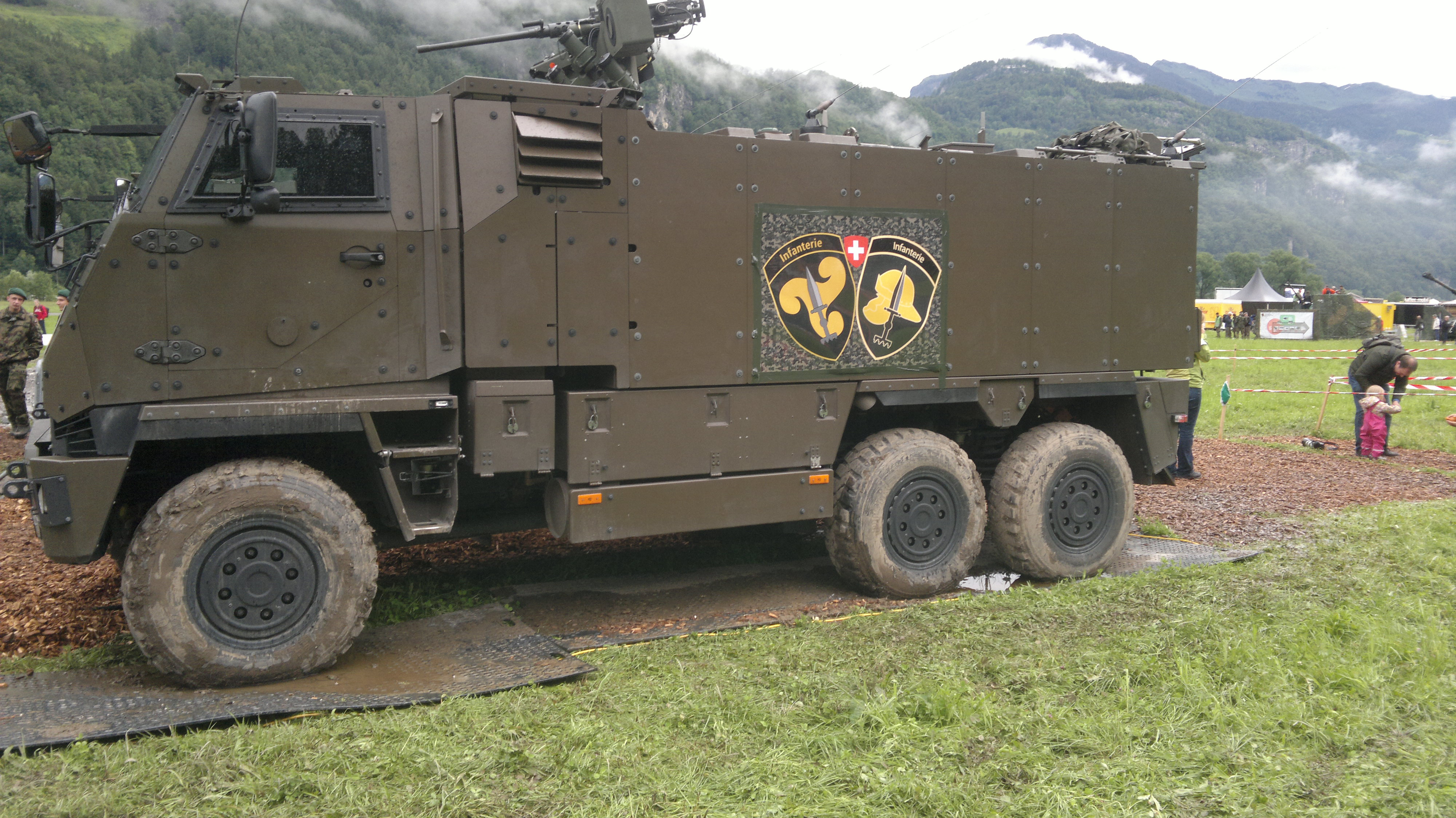 Mowag Duro Heer Wappen